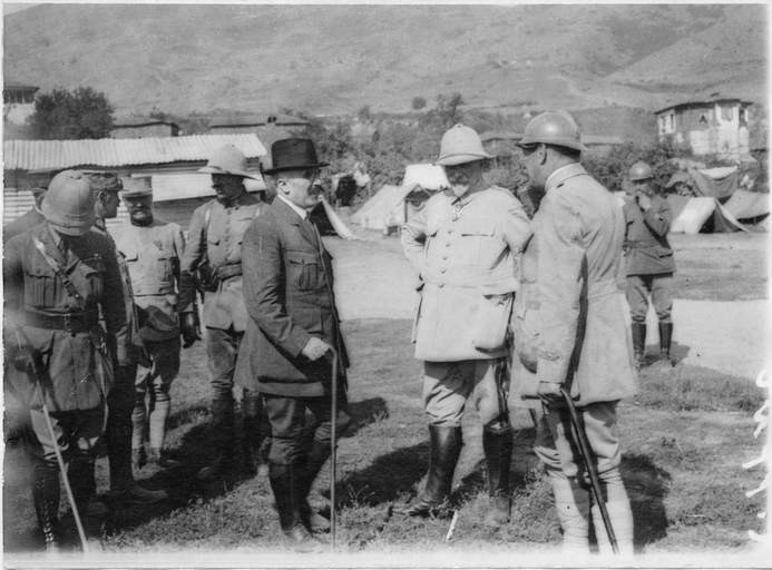 photographie de J. Godart en GGrèce.